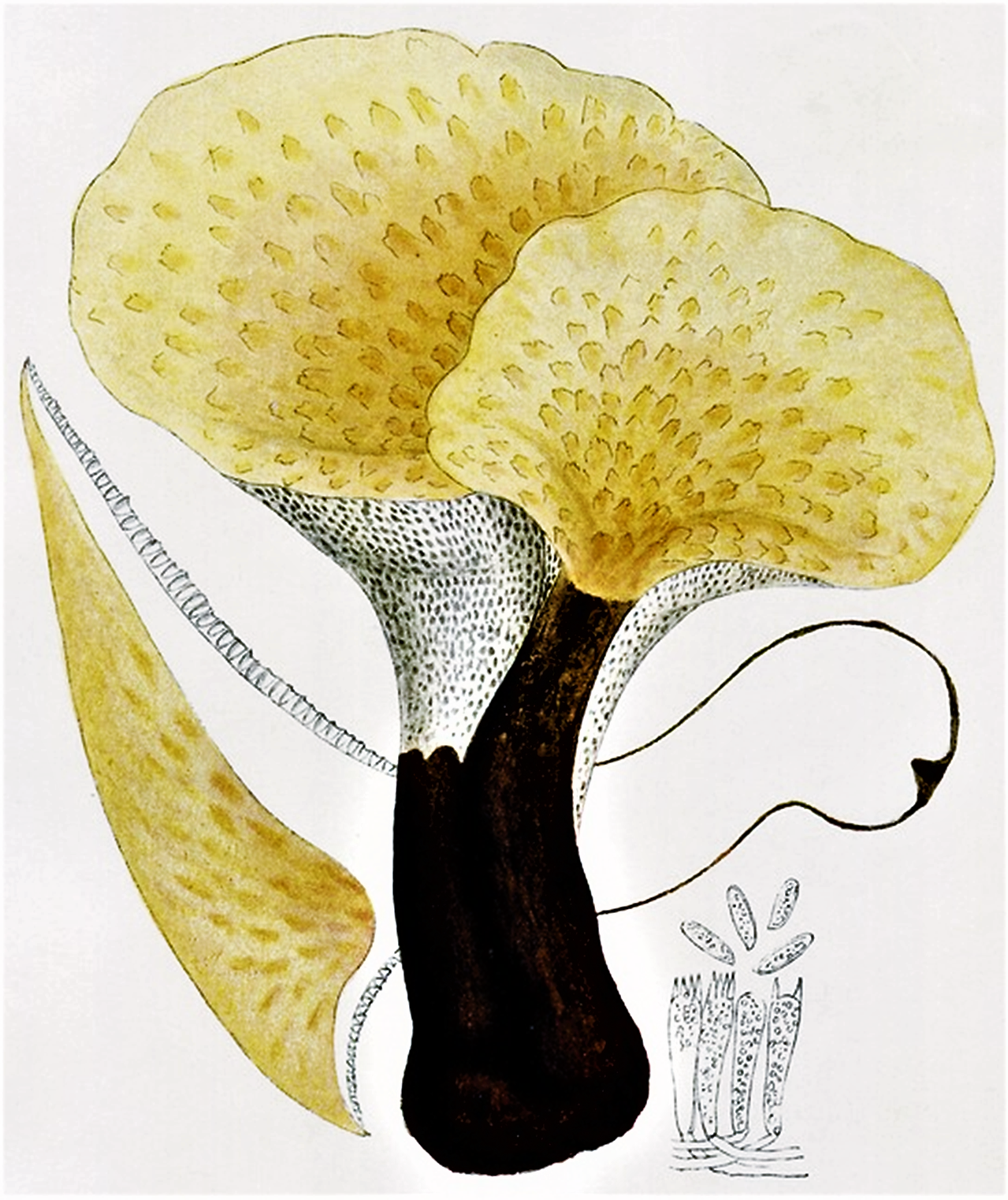 Giacomo Bresadola: Polyporus squamosus (Huds. 1778) Fr. (1821)